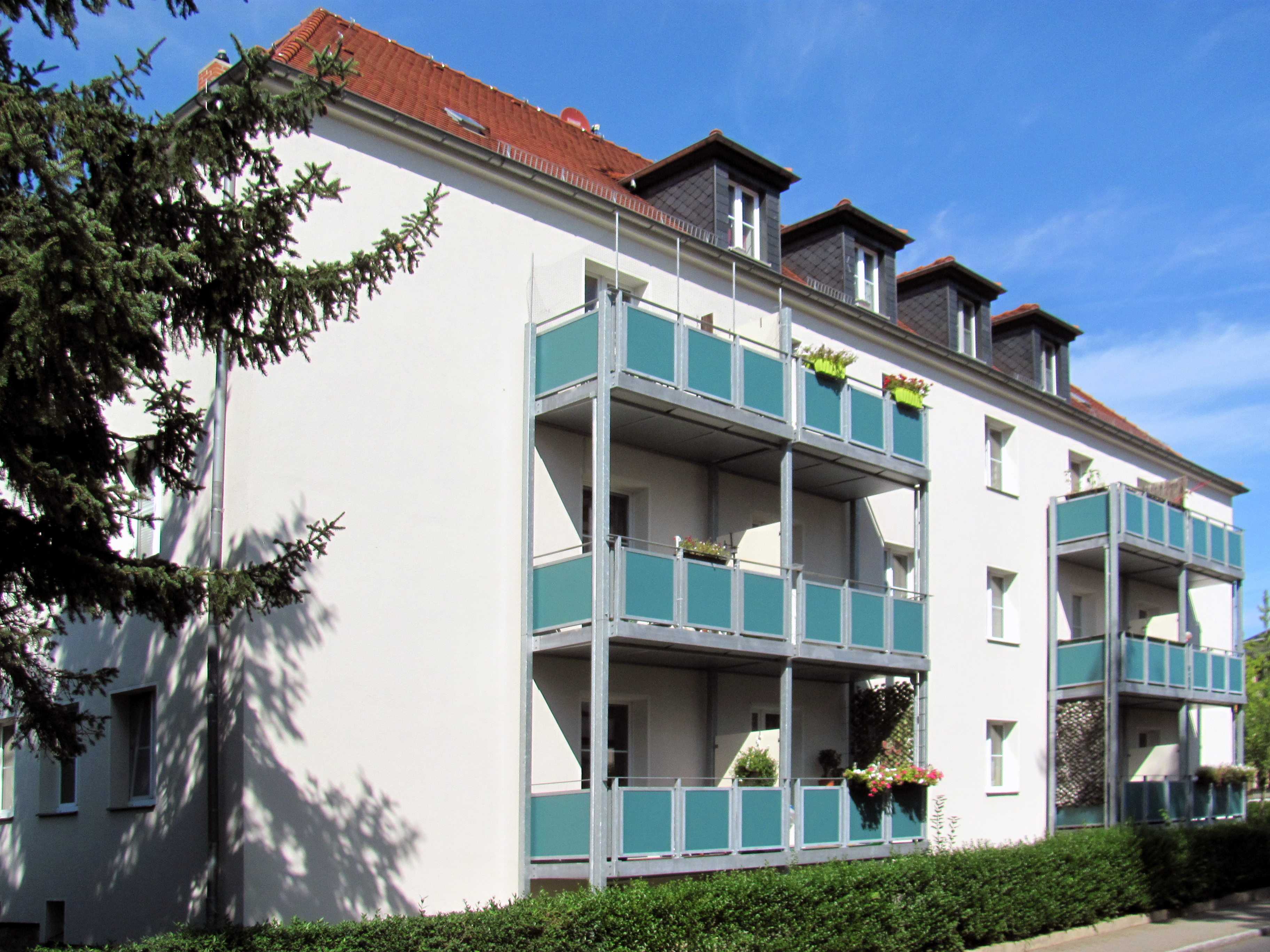 Radebeul (Gemarkung), Doppelwohnhaus Wichernstraße 21/21a (Radebeul)